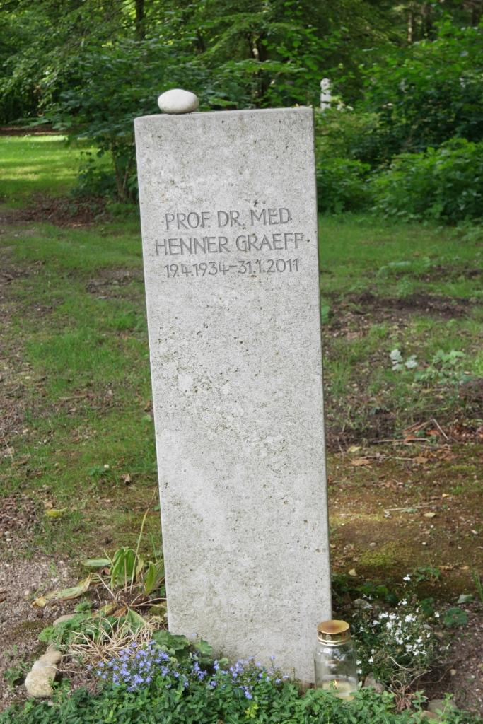 Grab des Mediziners Henner Graeff, 1934-2011, auf dem Waldfriedhof in München-Solln